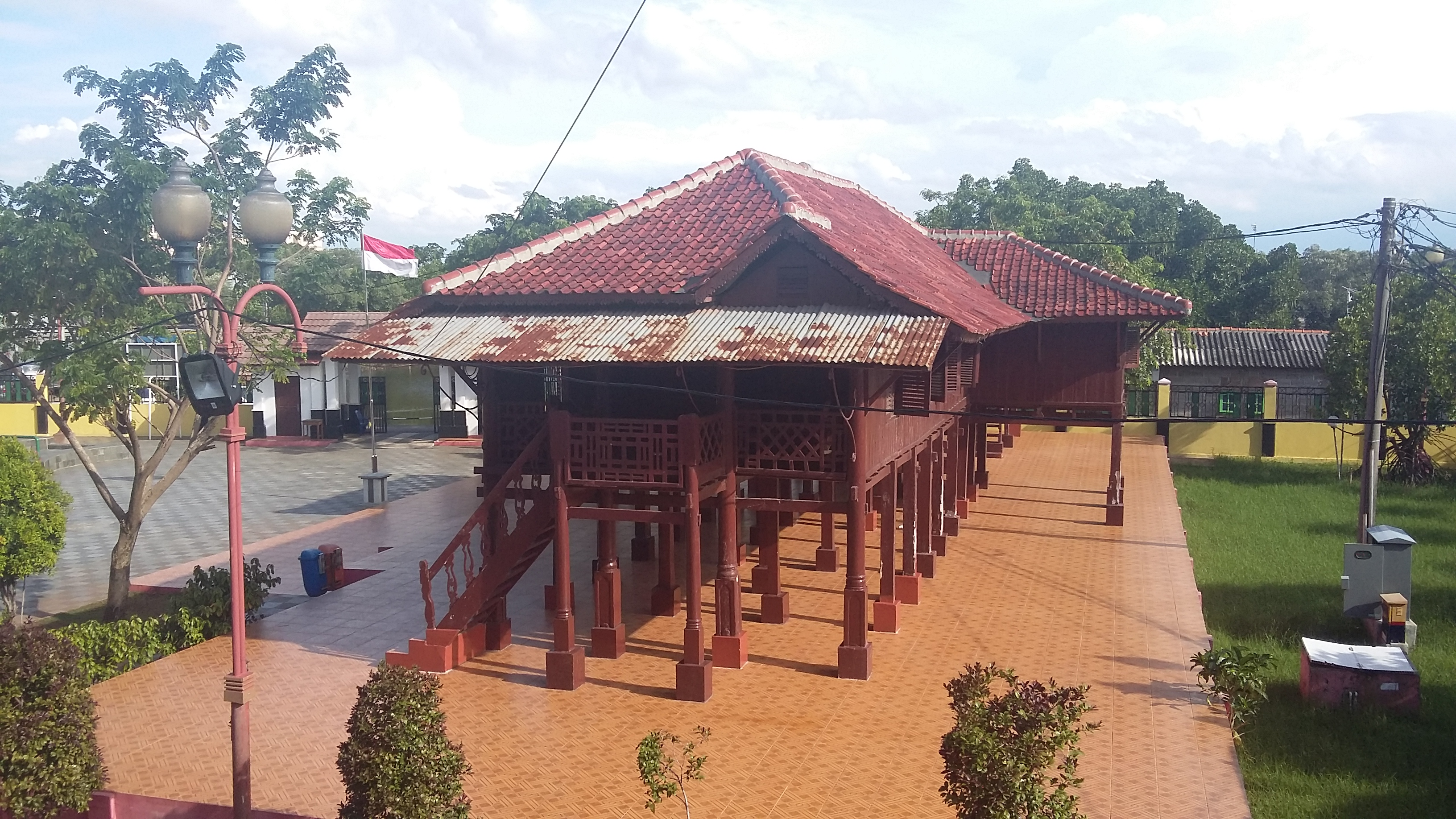 Tampak depan rumah singgah Si Pitung, di Kelurahan Marunda, Jakarta Utara.